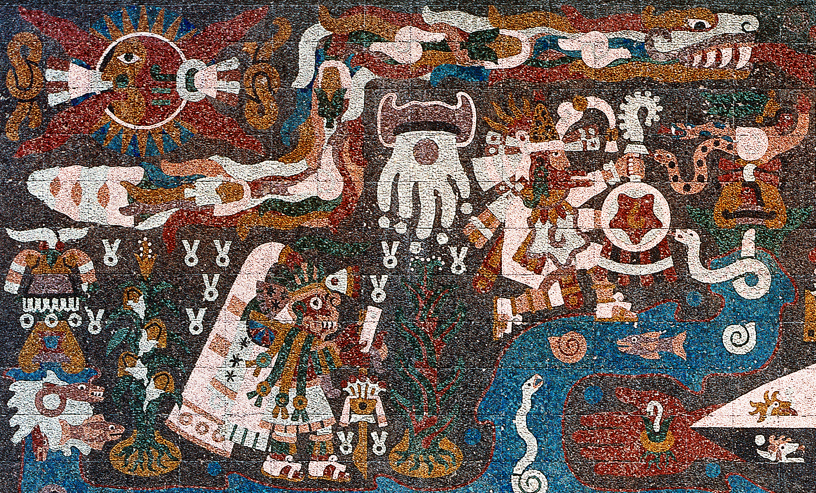 En el muro norte del mural Representación Histórica de la Cultura de la Biblioteca Central de la UNAM, en Ciudad Universitaria, México, D.F., México. Del lado izquierdo del eje central del muro norte, aparecen las deidades y escenas asociadas con la fecundidad y con las fuerzas creadoras de la vida: el sol, enmarcado por el mítico Quetzalcóatl en forma de serpiente, benefactor de los hombres; Tláloc, deidad del agua, con una estera a sus espaldas; Huitzilopochtli con su yelmo de colibrí en la cabeza, dios de la guerra y poder solar.